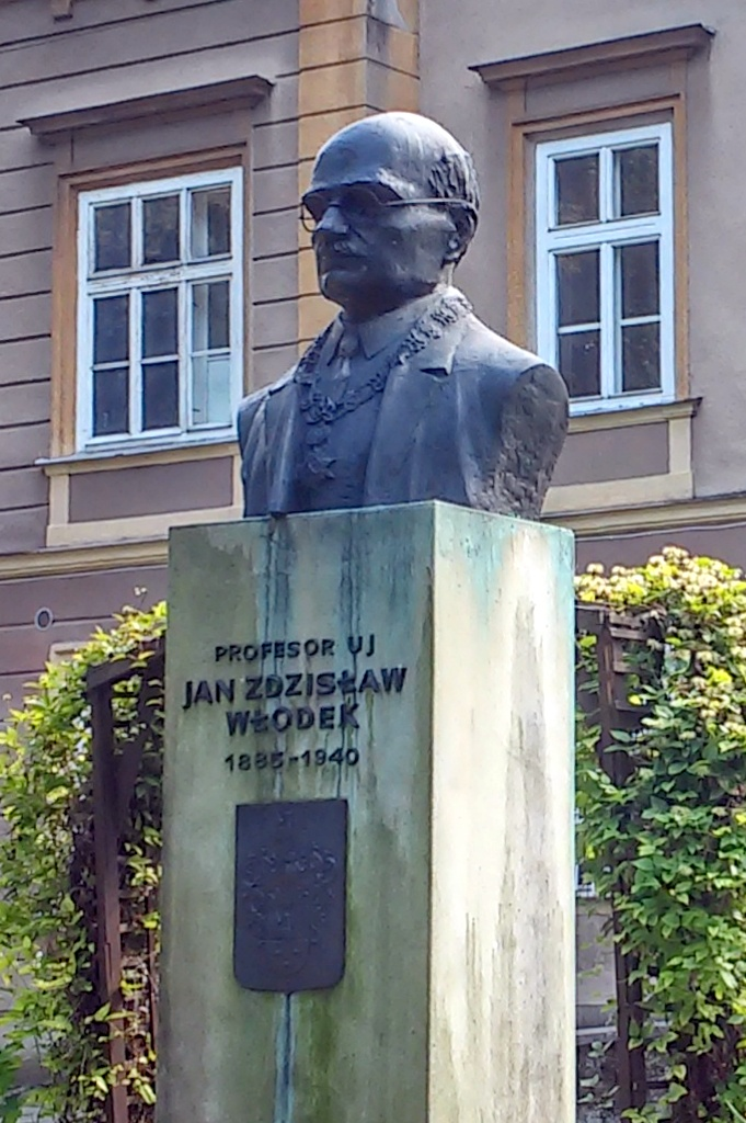 Pomnik Jana Włodka, Dąbrowica-Chrostowa, Polska